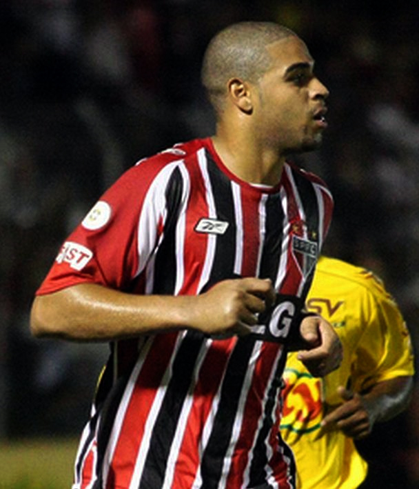 Adriano, jogador de futebol brasileiro, pelo São Paulo.IMG_0277 - PAULISTÃO 2008